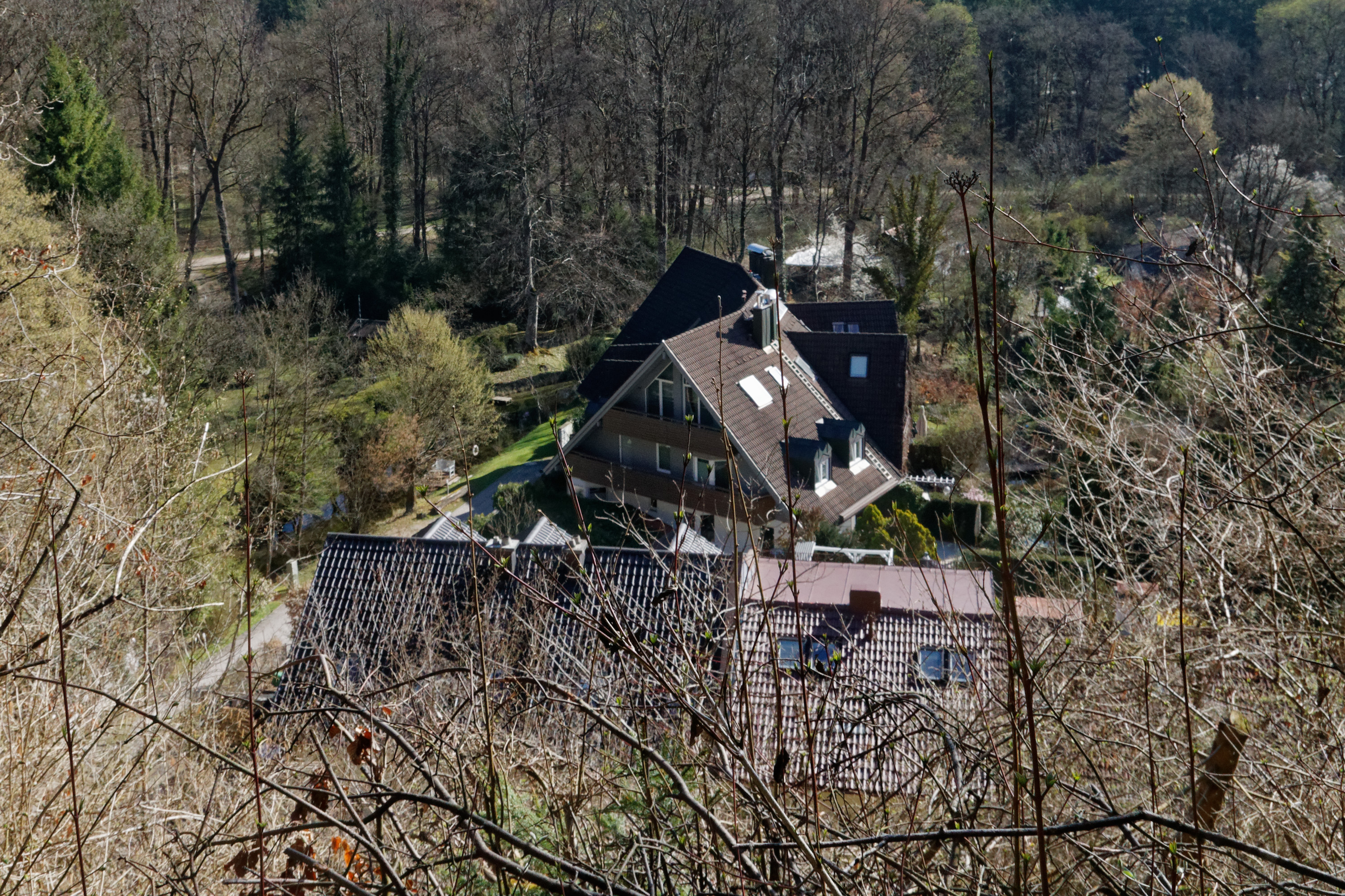 Pullach im Isartal, Blick vom Isarhochufer auf die "Adolf-Wenz-Siedlung" im Tal bei der Großhesseloher Brücke